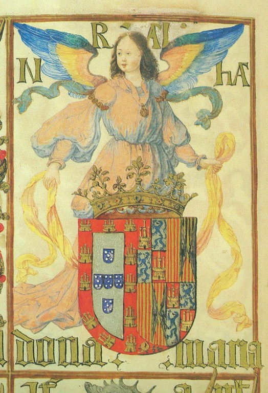 escudo de armas de Maria de Aragón